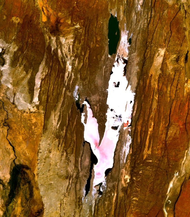 Satellite photograph of Lake Magadi, in Kenya.